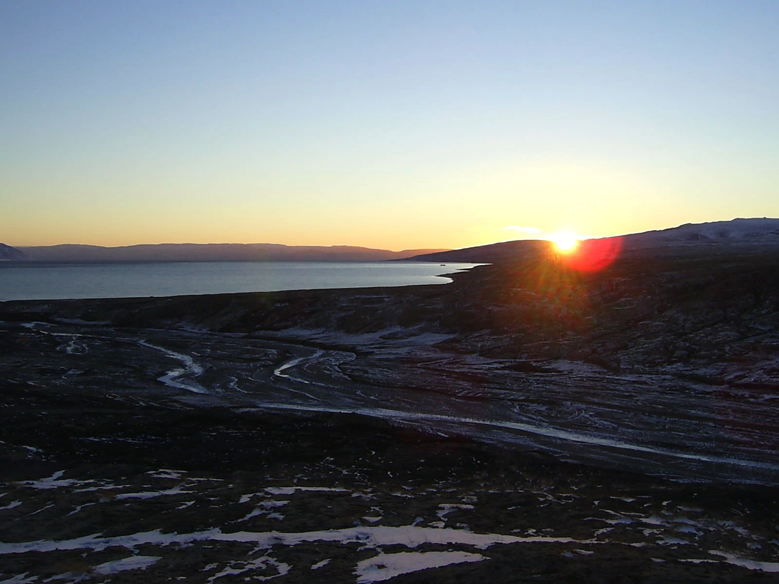 sometime after midnight